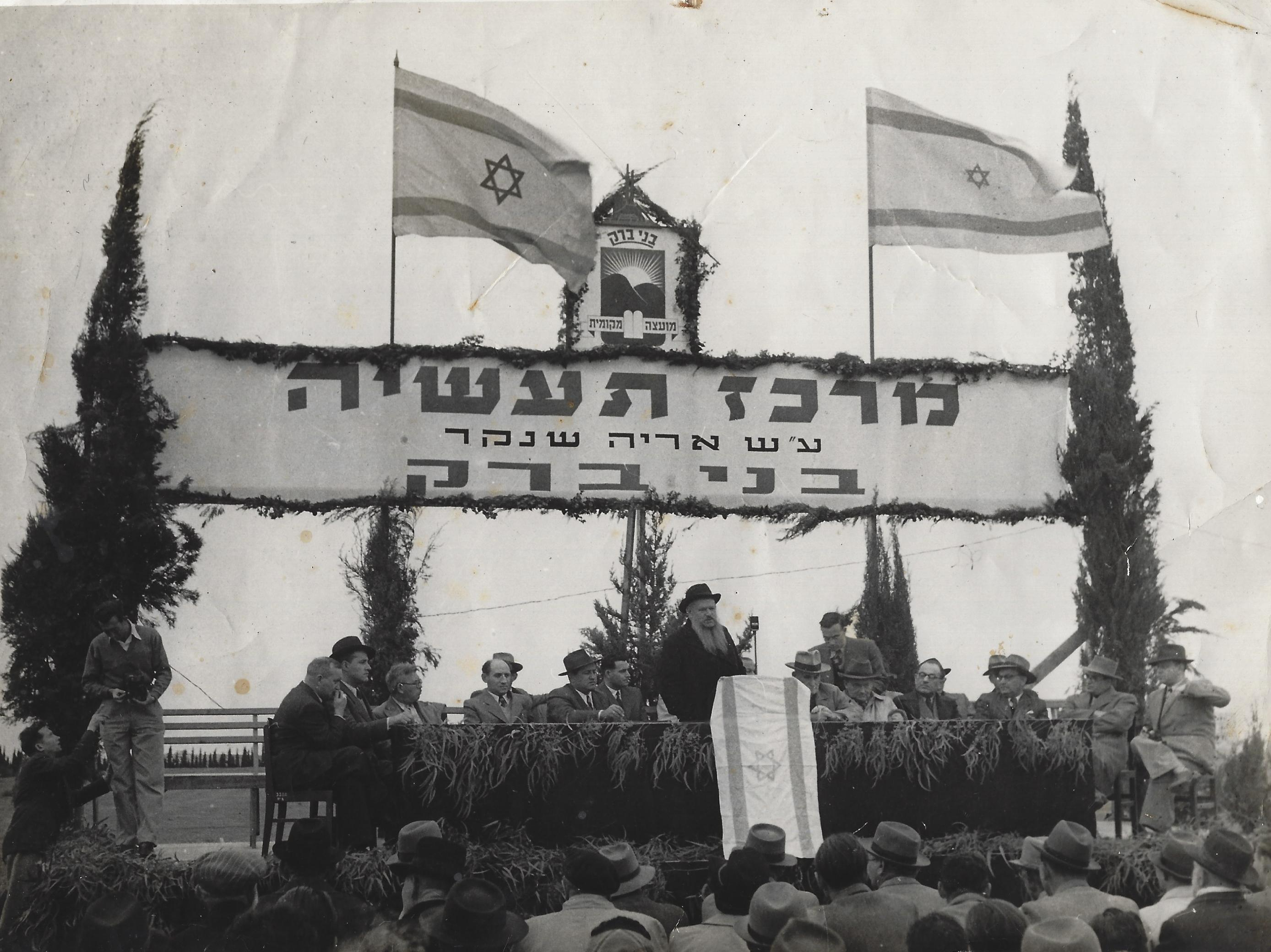 חגיגת הנחת אבן הפינה למרכז התעשייה ע"ש אריה שנקר(מידע נוסף), על אדמת קק"ל בבני-ברק. נואם בתמונה ראש העיר הראשון של בני ברק, יצחק גרשטנקורן